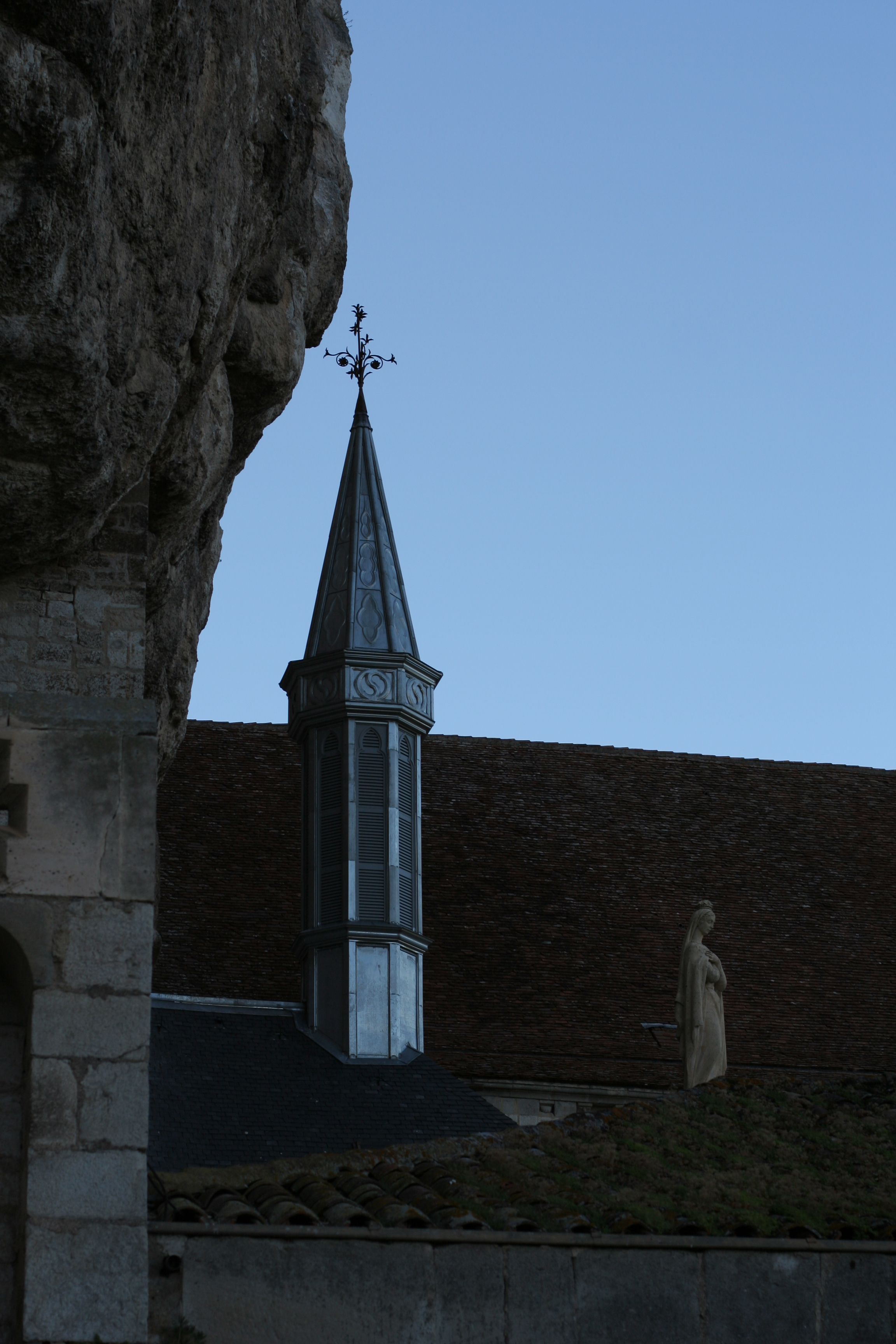 Cité religieuse (InscritClassé) .